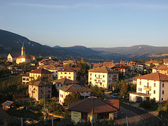 Dambel